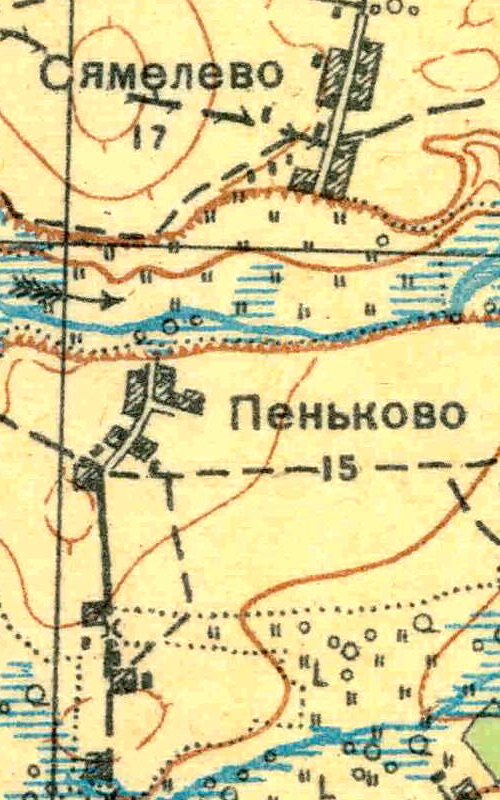 Топографическая карта Ленинградской области, квадрат О-35-24-Б-г (Б. Борницы), деревня Пеньково